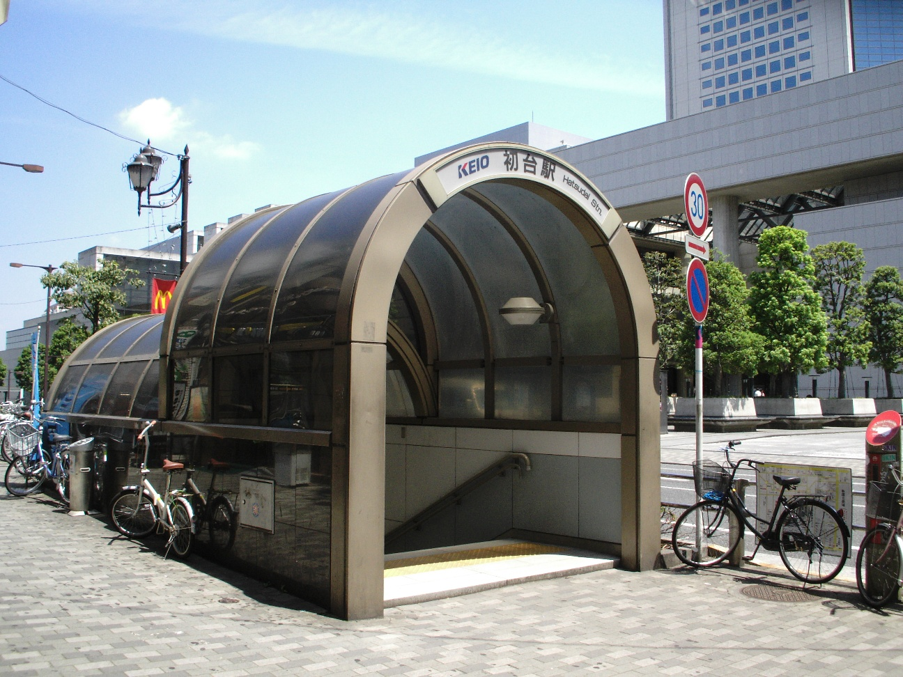 初台駅